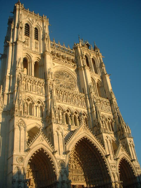 Catedral de Amiens fachada de la catedral Notre Dame de Amiens